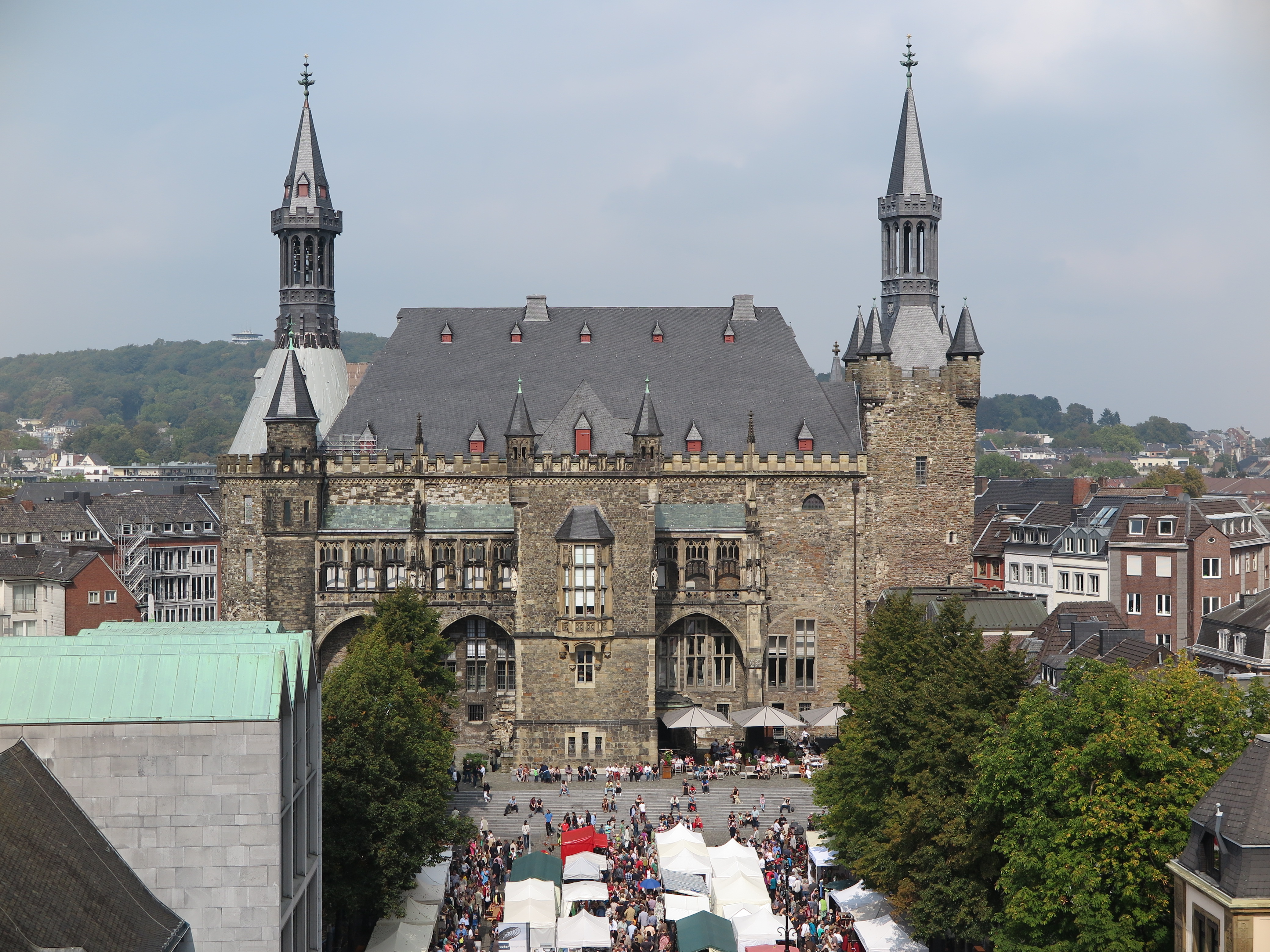 Blick vom Aachener Dom über den Katschhof auf das Aachener Rathaus. Links erkennt man die Domsingschule. Auf dem Katschof findet gerade der Europamarkt für Kunsthandwerk und Design statt.